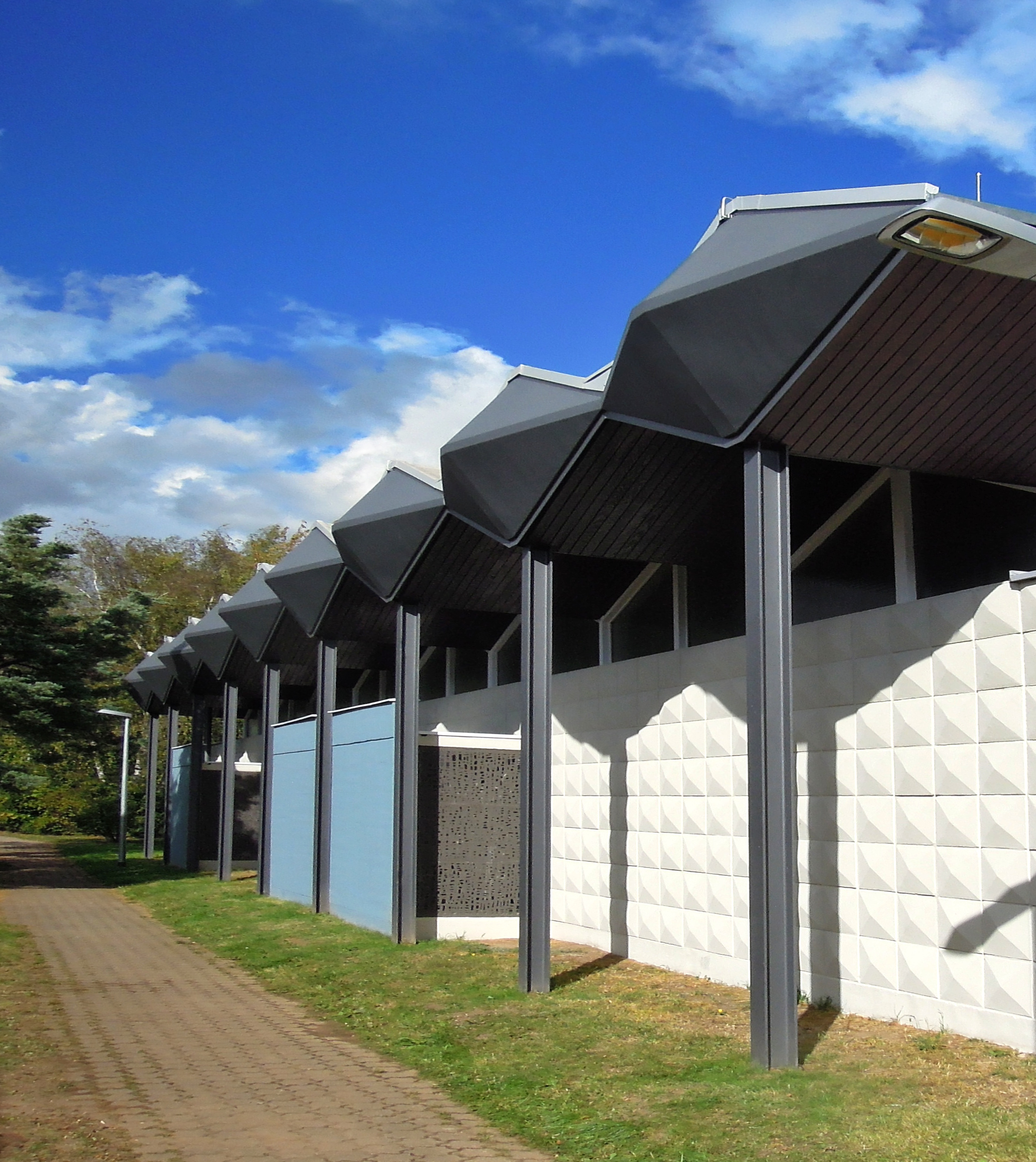 Berliner Straße o. Nr., Flur 3, Flurstück 202, 203, 181/12, 181/87, Pfarrzentrum mit kath. Pfarrkirche Maria Trost und Kindergarten, 1961-63 von Konrad Schmitz (Einzeldenkmal)